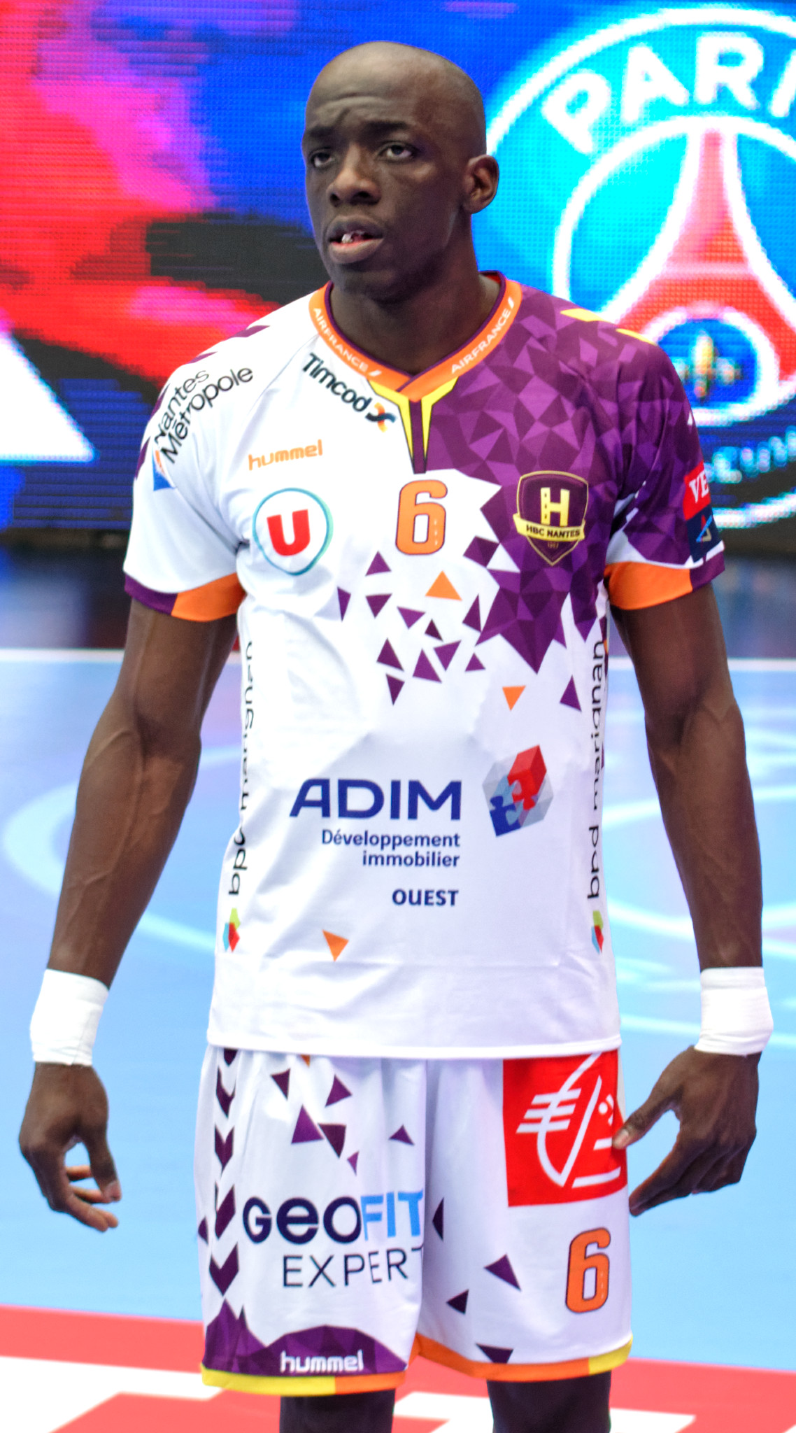 Huitième de finale de la ligue des champions 2016-17 entre le PSG et le HBC Nantes. A Coubertin, le 1er avril 2017.